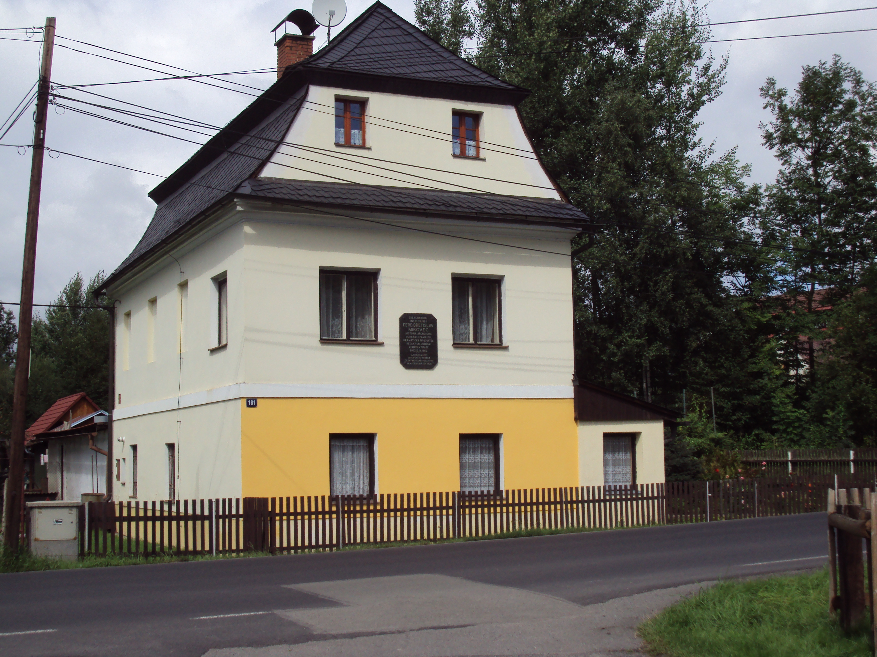 Rodný dům básníka Břetislava Mikovce je u hradu Sloup, uprostřed je tmavá pamětní deska